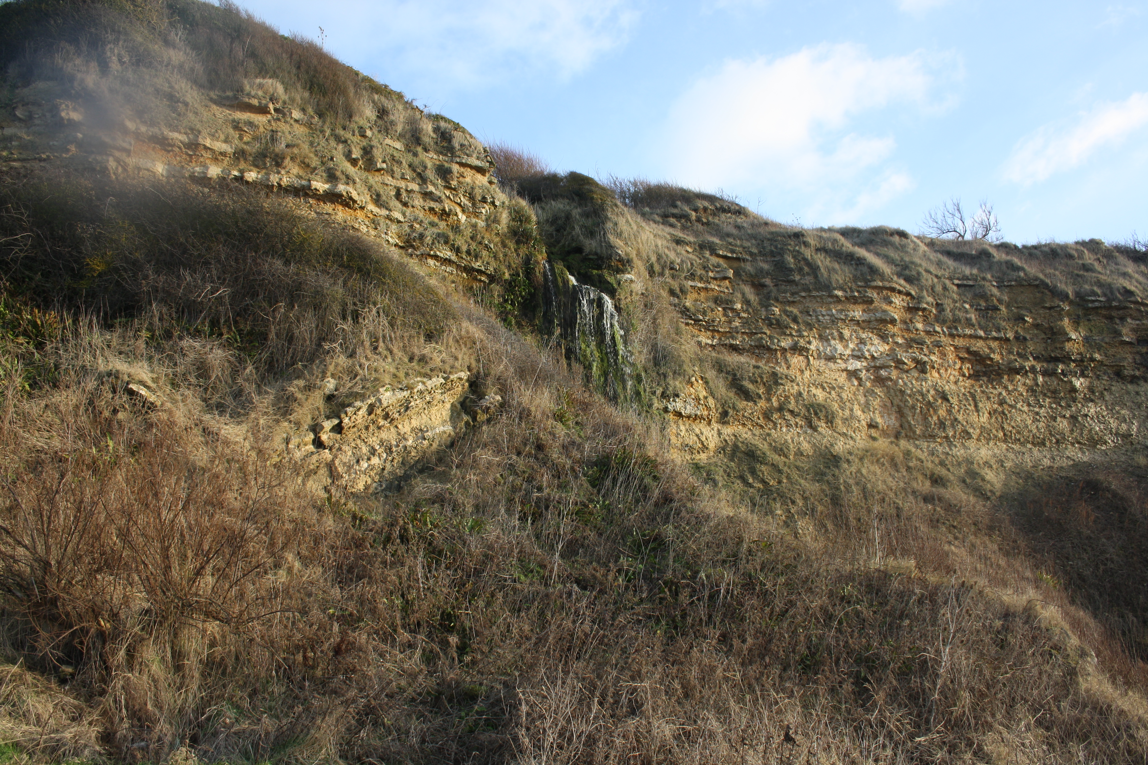 falaise en Normandie à Trouville